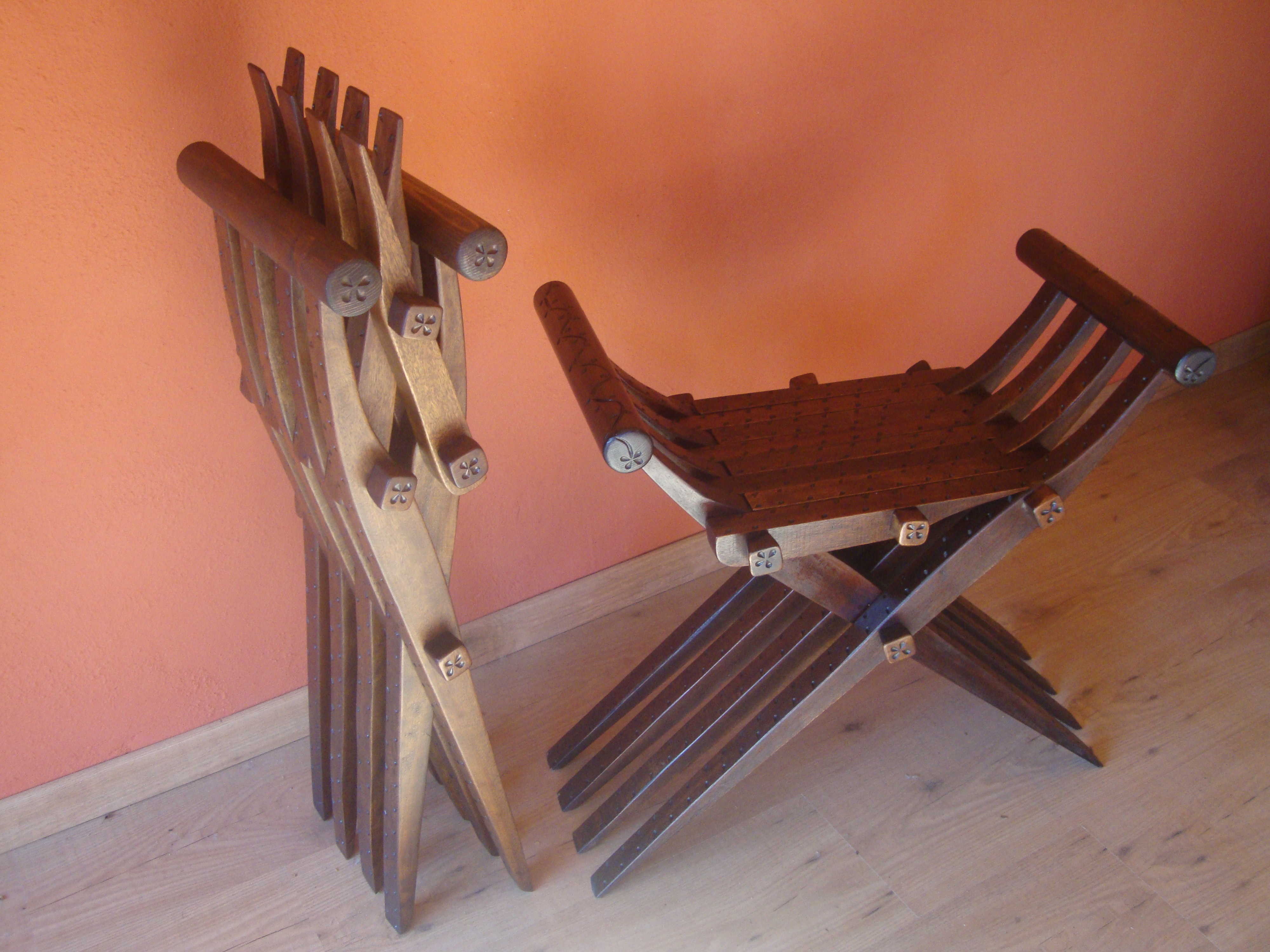 Silla plegable medieval